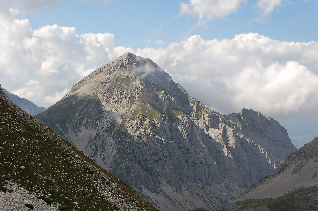 Campo Imperatore 2011